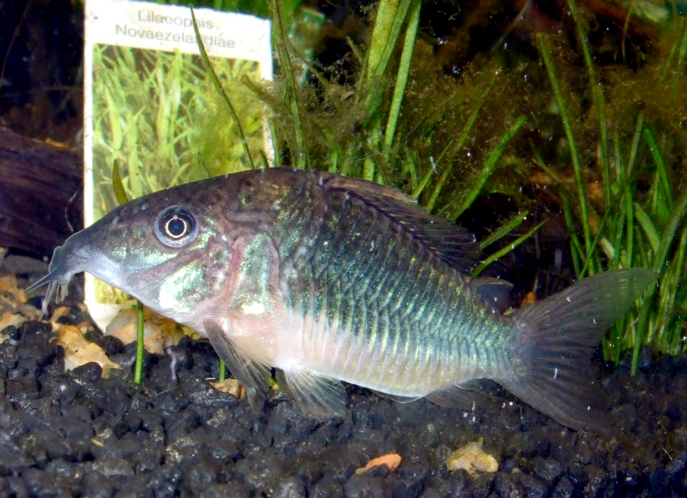 Brochis splendens am 25.09.07 nach dem Einsetzen ins Aquarium. Das Tier hat die Rückenflosse noch angelegt. Nach erfolgter Eingewöhnung und bei gutem Wohlbefinden stellen die Welse die Rückenflosse in der Regel auf.